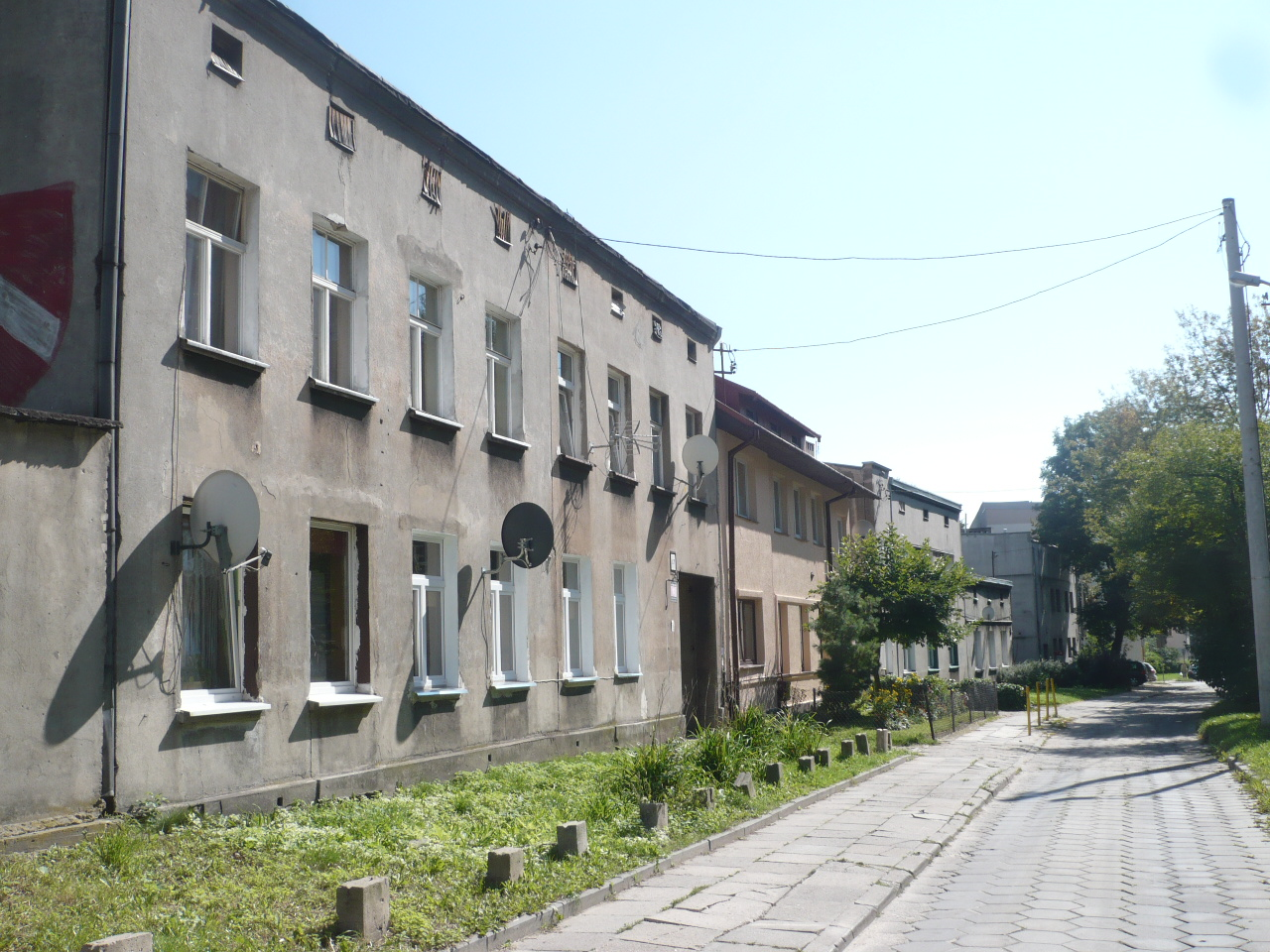 Łódź, ul. Przemysłowa na odcinku od Brackiej do Wojska Polskiego (strona wschodnia). z zachowanym fragmentem oryginalnej przedwojennej zabudowy. Odcinek ten był jedynym dojściem do bramy głównej obozu dla dzieci przy ul. Przemysłowej od strony miasta (dla ludności "aryjskiej"). Stan z września 2014 r.